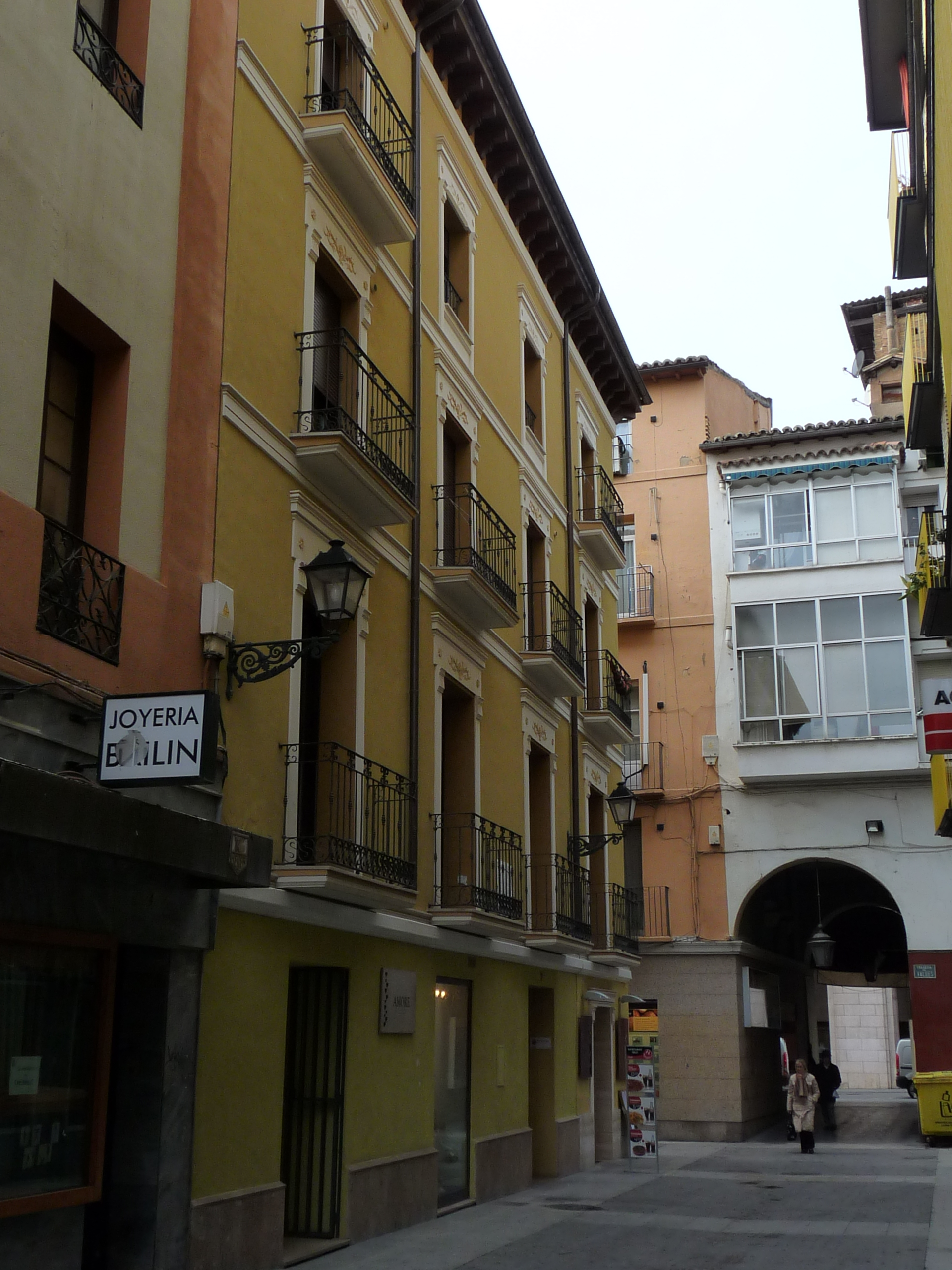 Huesca - Lucas Mallada - Casa natal (en amarillo).